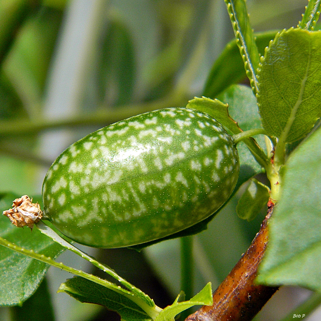 Melothria pendula (creeping cucumber) fruit